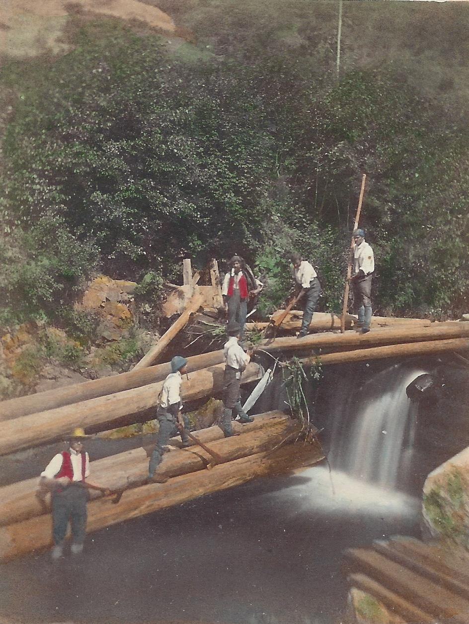 Ludovico Wolfgang Hart: Schwallung auf der Wolf (Schwarzwald), getinteter Albuminabzug, 1864